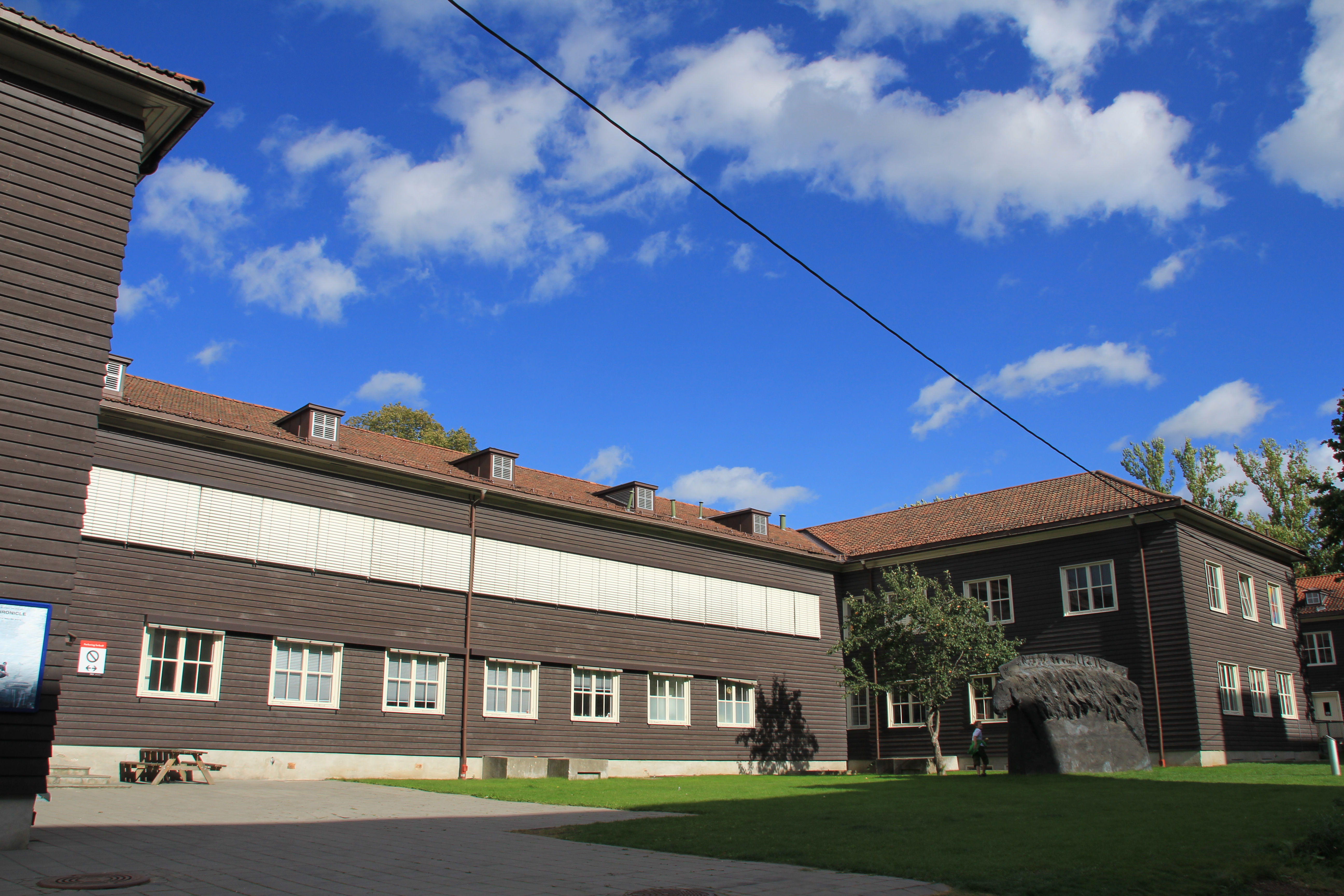 Løren leir er en tidligere militærleir på Løren i Oslo. Den ble anlagt av tyskerne under 2. verdenskrig.